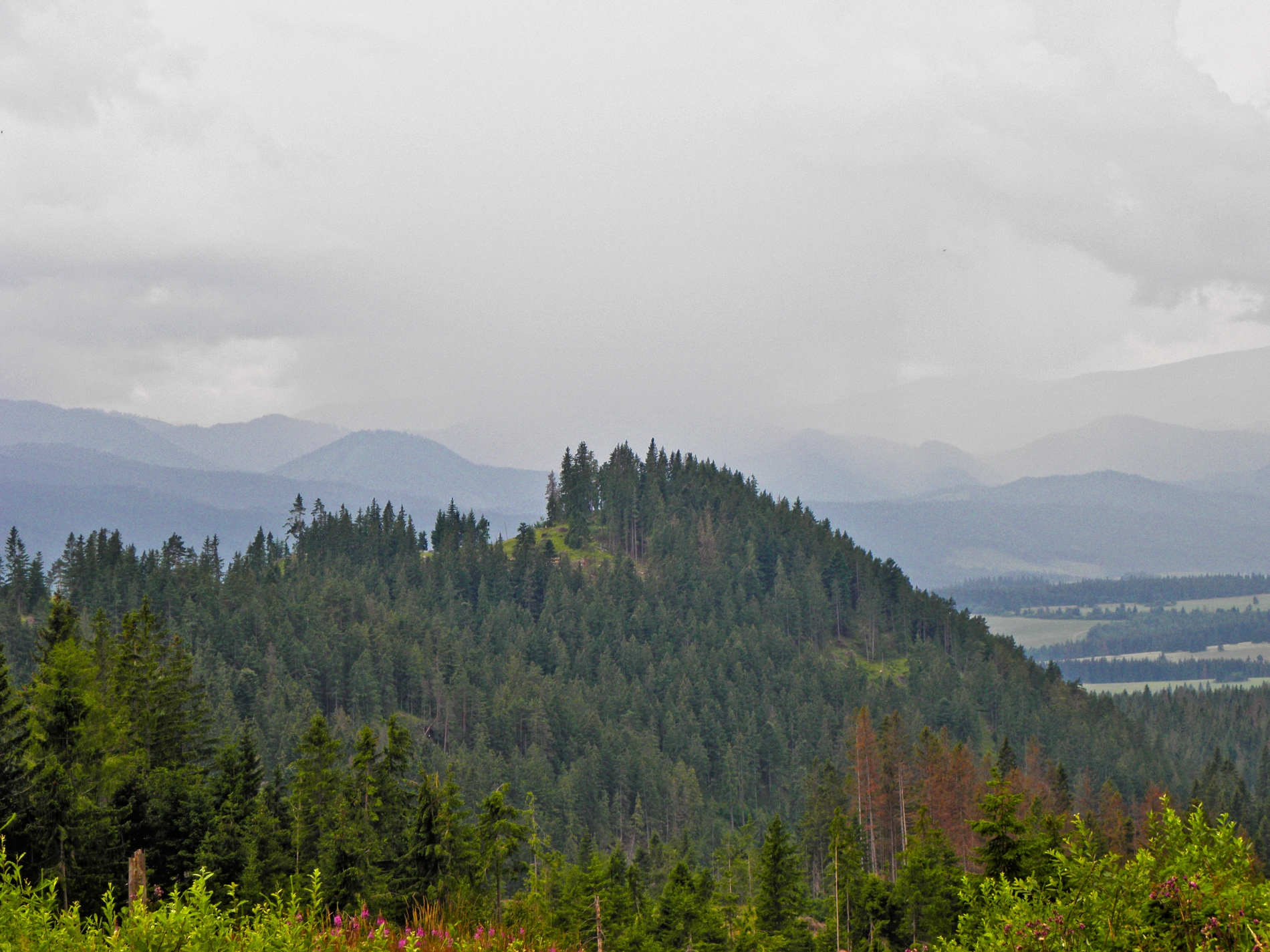 Hrádok nad Pavúčou dolinou je prírodná rezervácia, ktorá bola vyhlásená v roku 1991. Uprostred rezervácie sa nachádza vrch Hrádok (1 140 7 m n. m.)